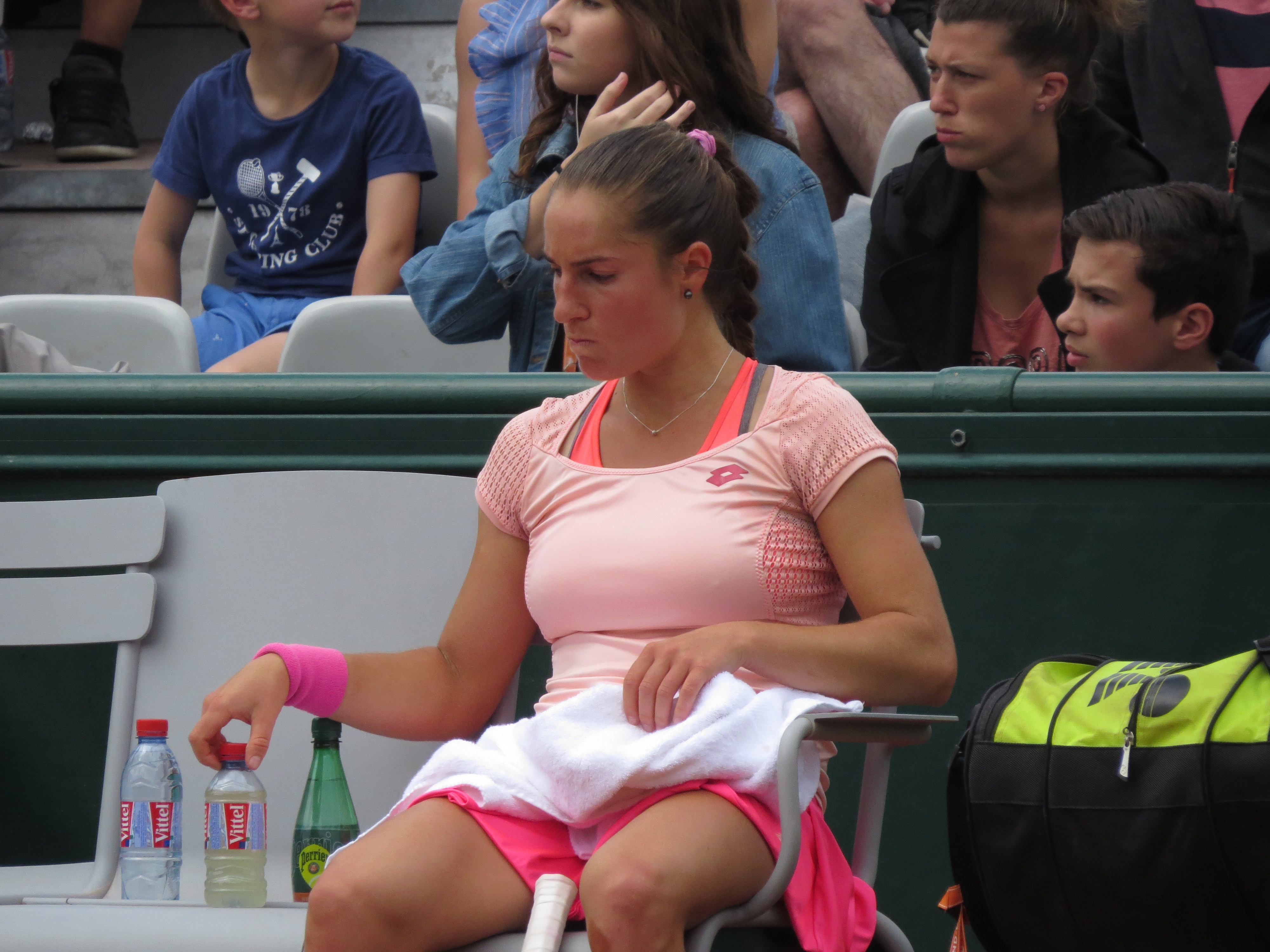 Jade Suvrijn lors de son premier tour des qualifications face à Alison Van Uytvanck (court n°6)